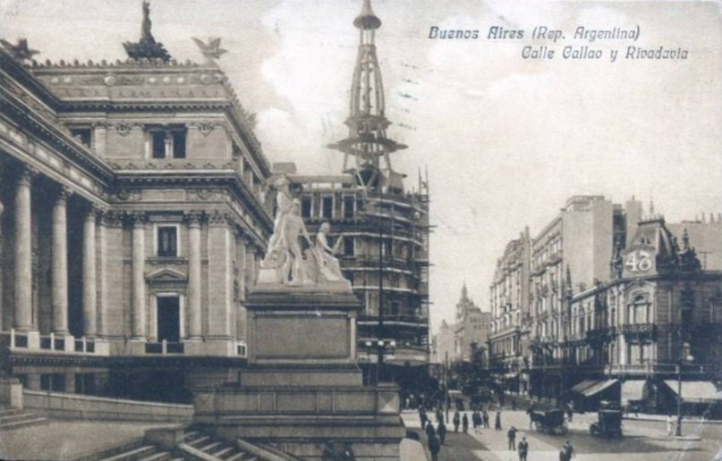 Vista desde la explanada del Congreso Nacional de la Avenida Callao, en Buenos Aires. A la izquierda, la Confitería del Molino en construcción.